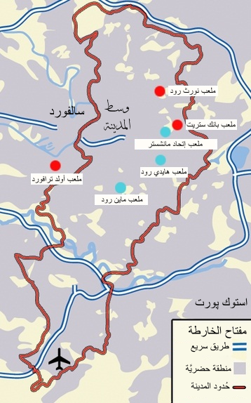 خارطة لمدينة مانشستر بإنگلترا تظهرُ فيها مواقع ستَّة ملاعب كُرة قدم (3 لِمانشستر سيتي و3 لِمانشستر يونايتد)، تستخدمها تلك الأندية مُنذ تأسيسها.